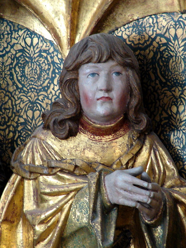 Frans (1511-21) kong Hans og dronning Christines yngste søn, fra Claus Bergs altertavle i Odense Domkirke, Fyn